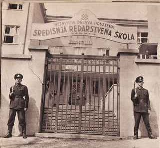 redarstvena škola u zagrebu